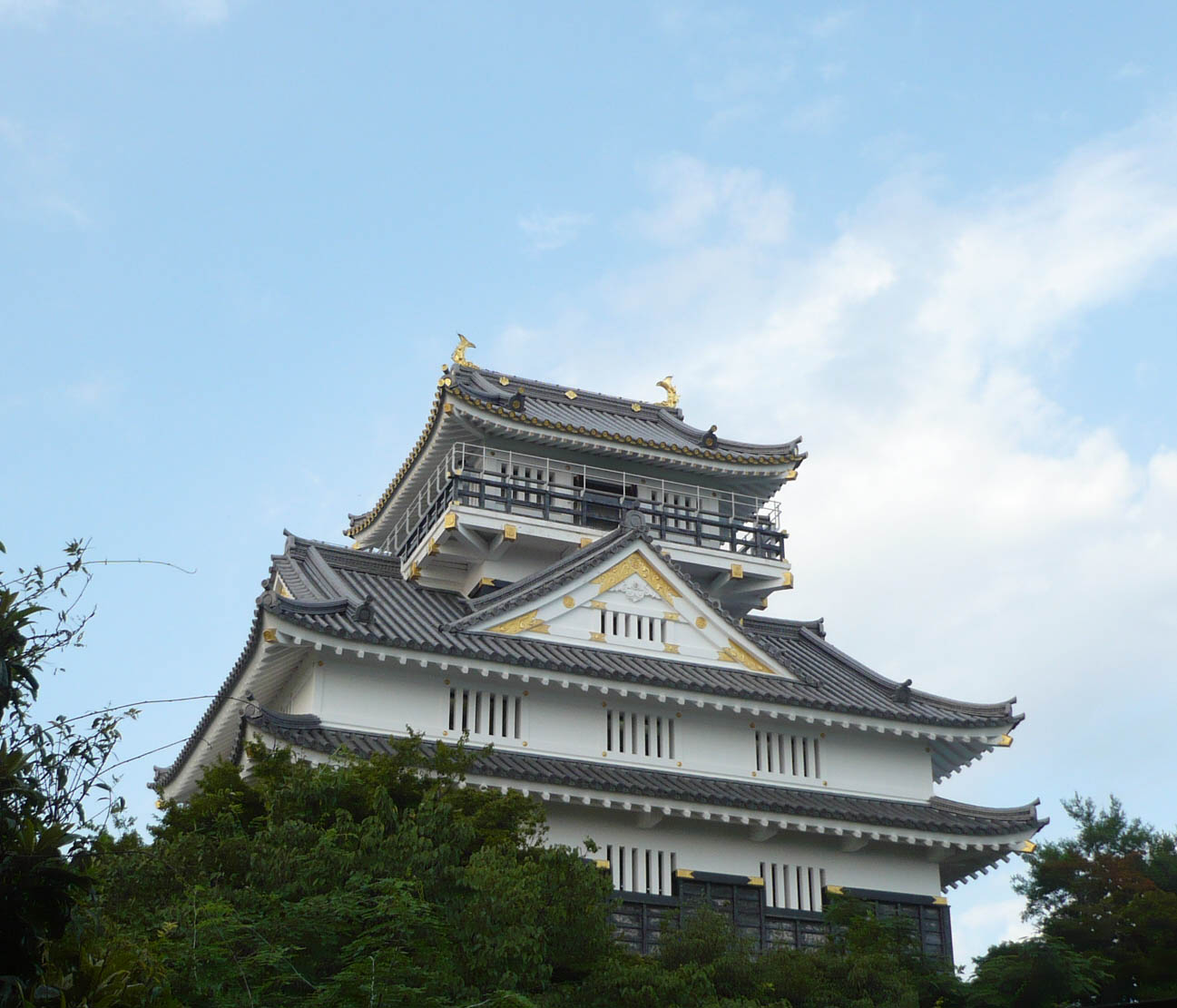 岐阜城の復興天守